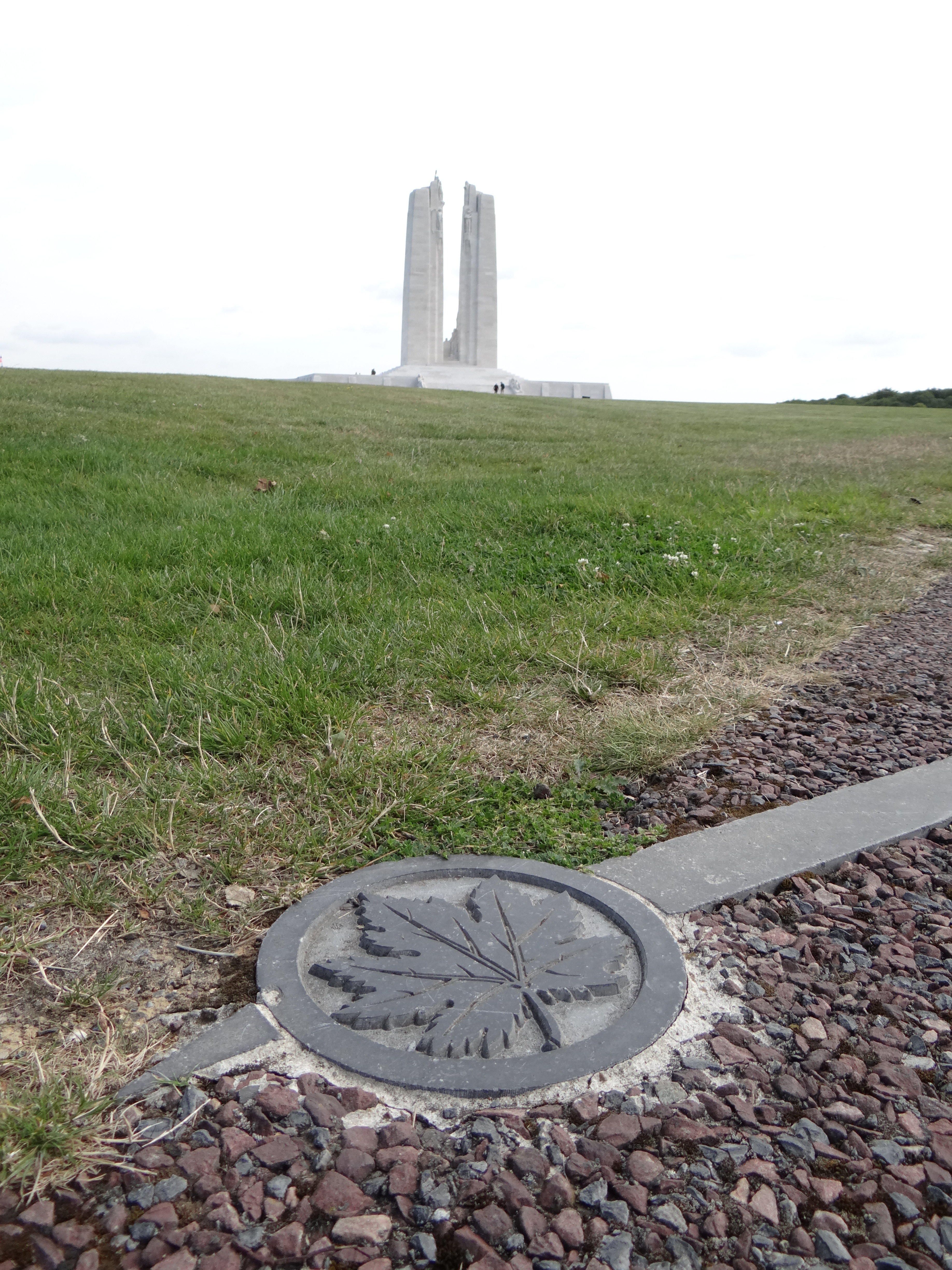 Parc Mémorial Canadien de Vimy